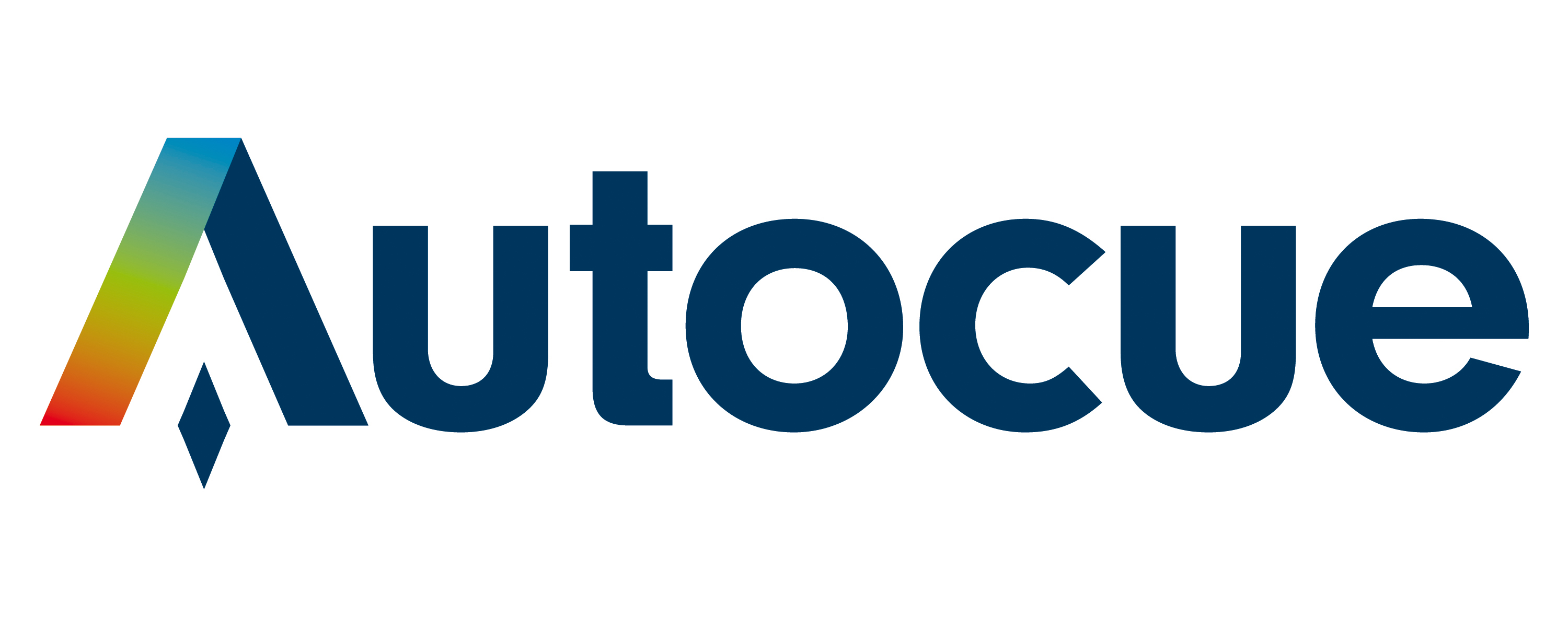 Logo Autocue